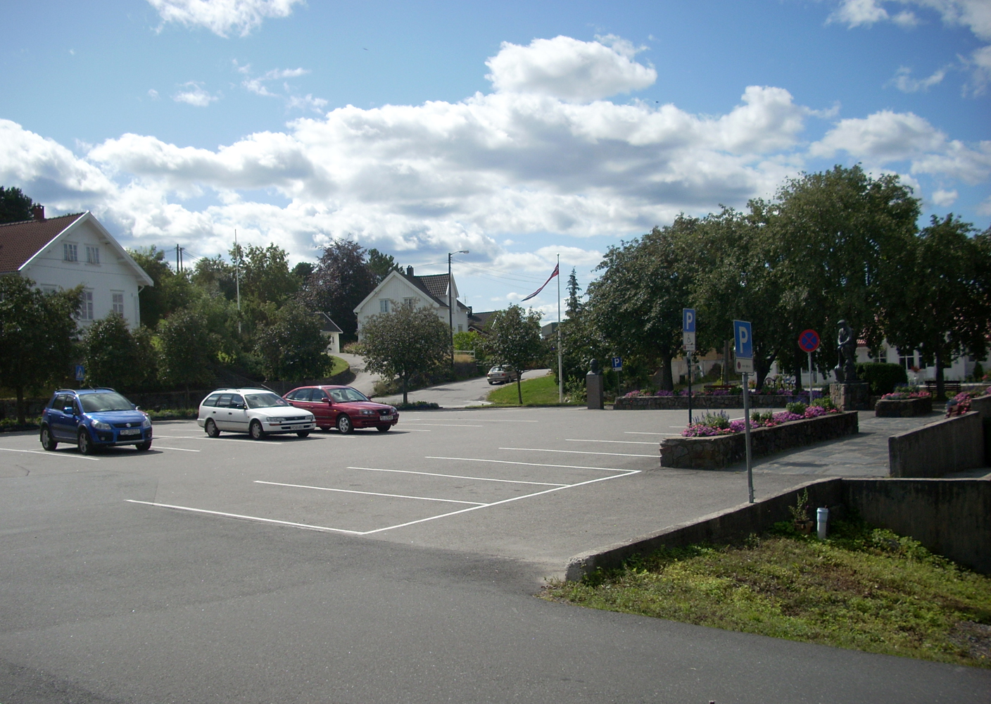 Eydehavn torv